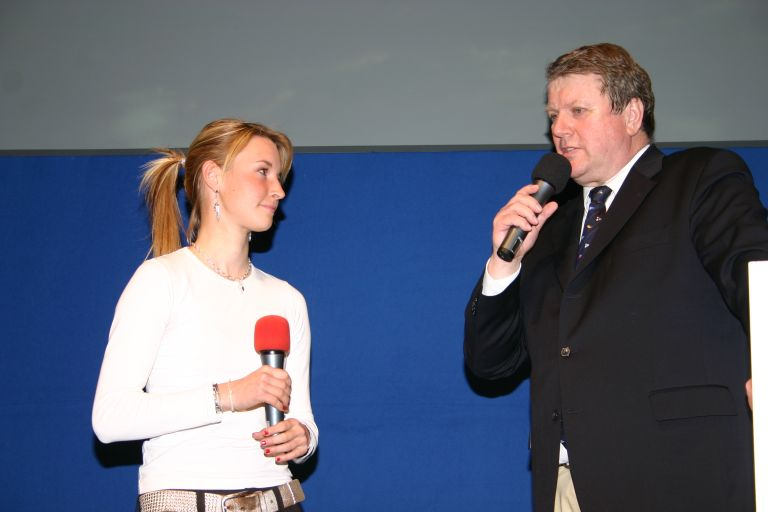 Tina Lutz mit Yacht-Redakteuer Christoph Schumann